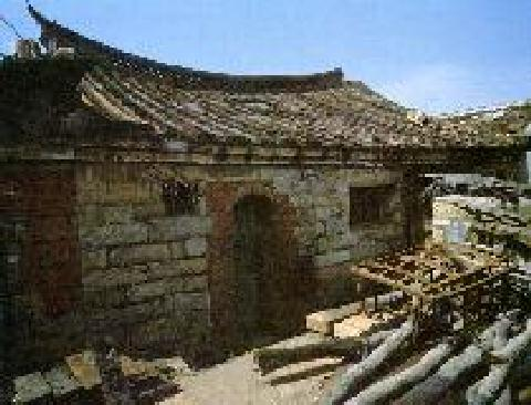 Templet i Fujien